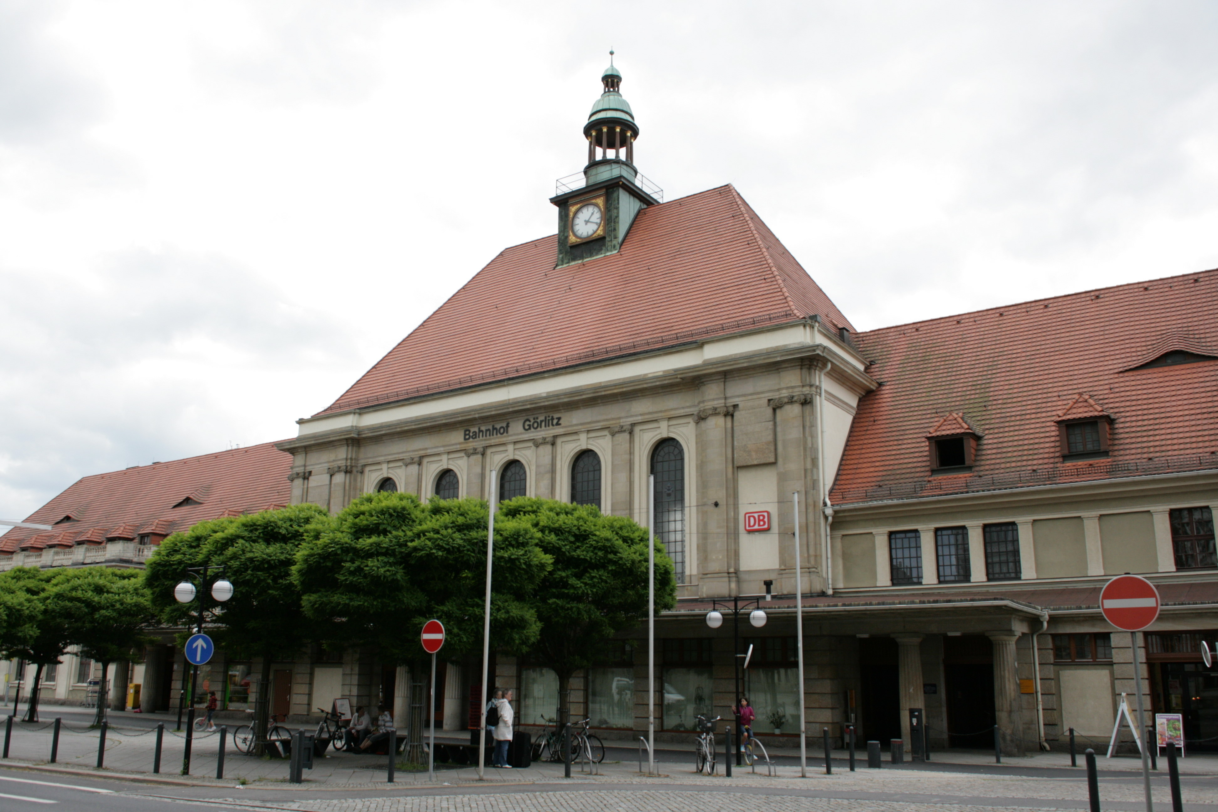 Bahnhof in Görlitz